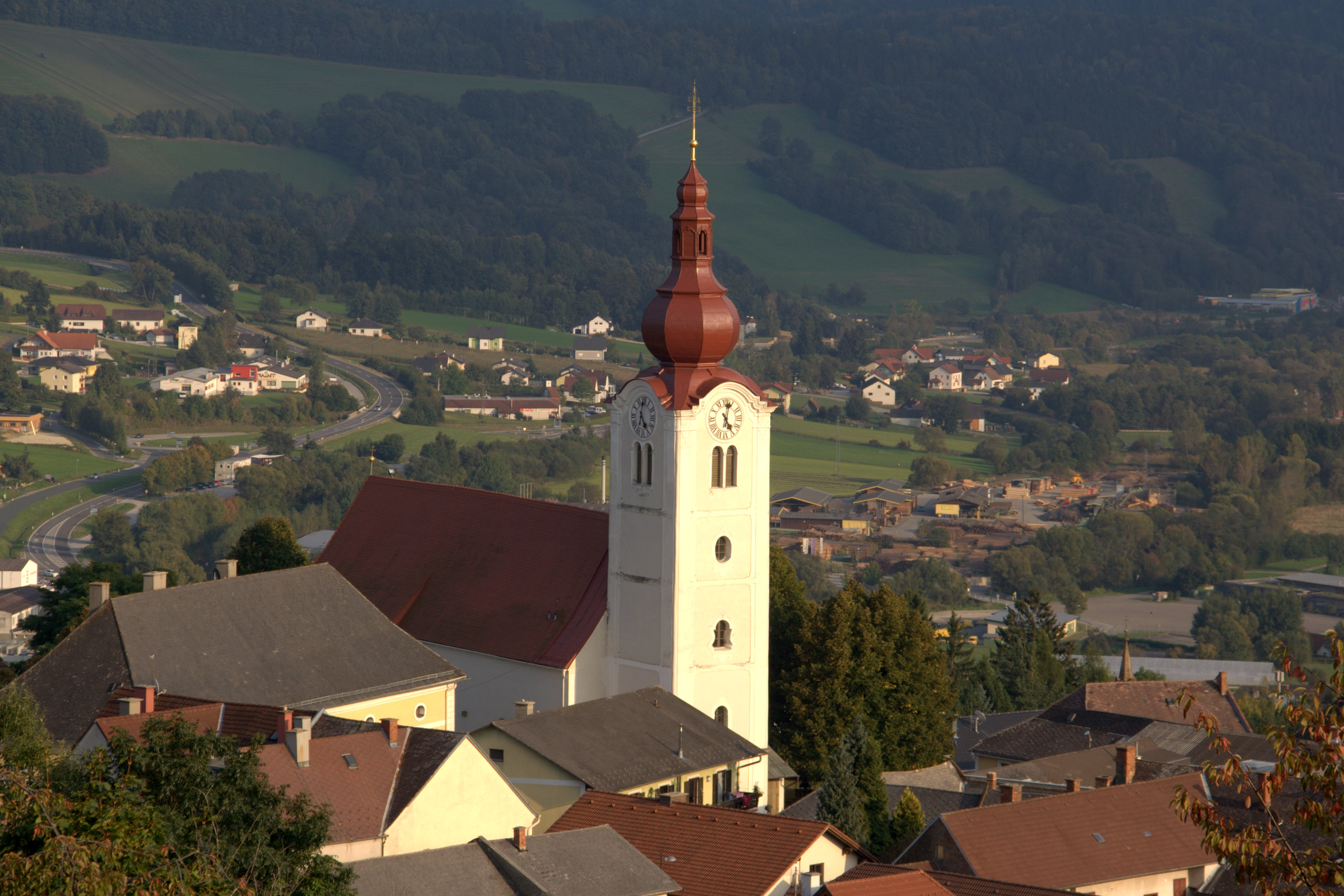 Kath. Pfarrkirche hl. Jakobus d. Ä. und Teilabschnitte von Stadt- und Friedhofsmauer